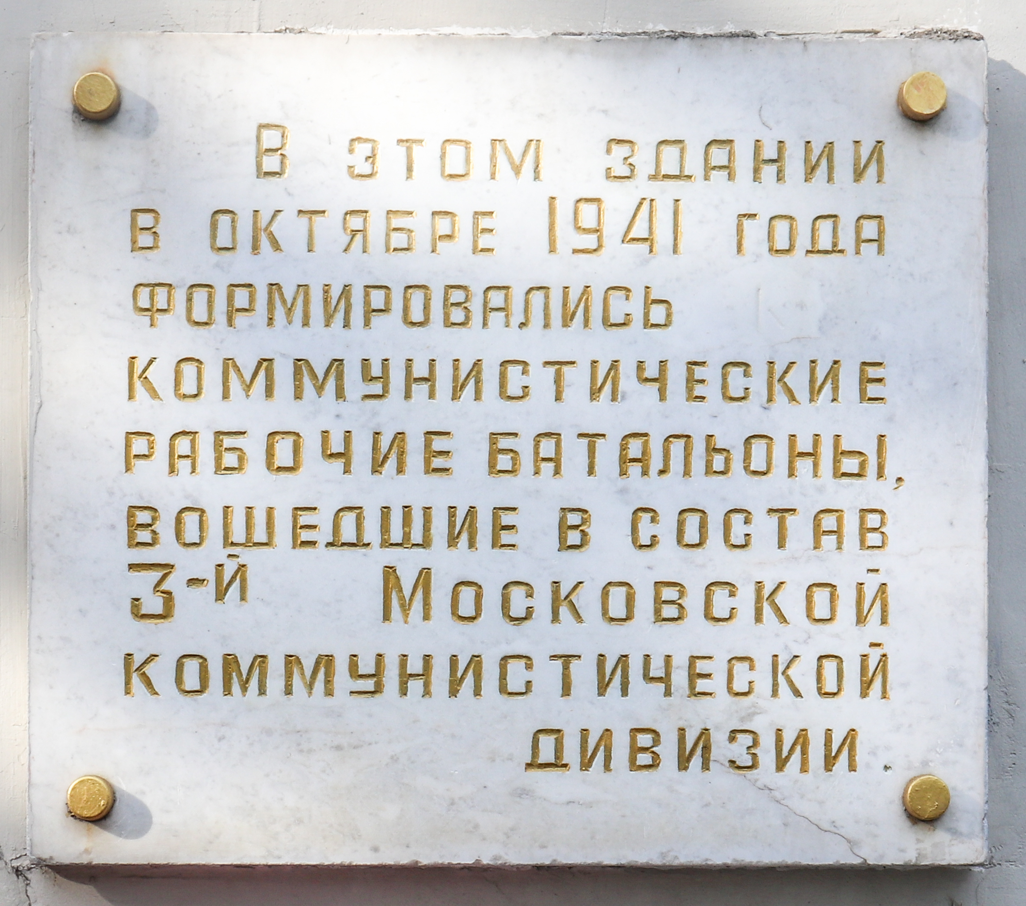 Мемориальная доска в память о формировании Коммунистического рабочего батальона 3-й Московской Коммунистической дивизии. Доска из белого мрамора, была установлена в 1975 году во дворе школы № 315 (Русаковская улица, 10, стр. 1).